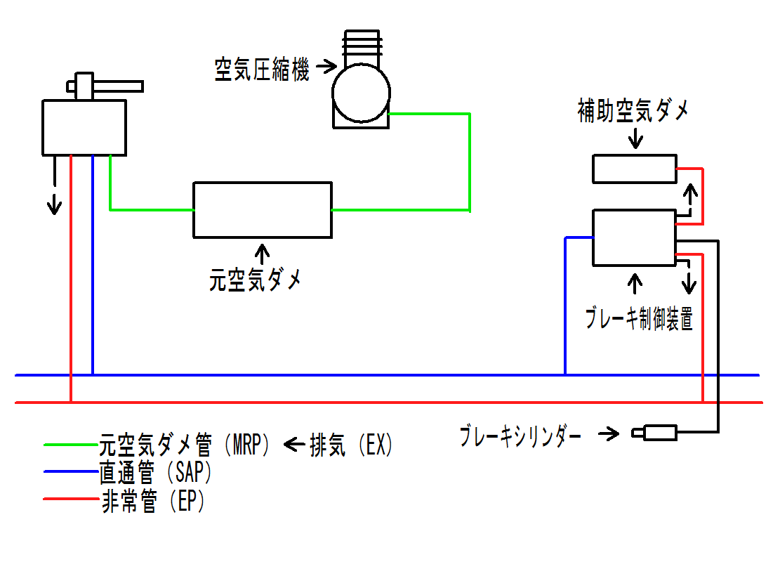 SMEブレーキのシステムのモデル図